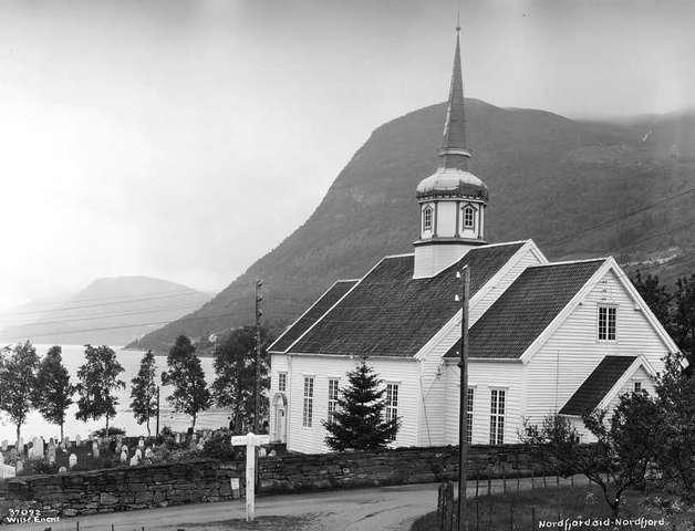 Eid kyrkje Nordfjoreid